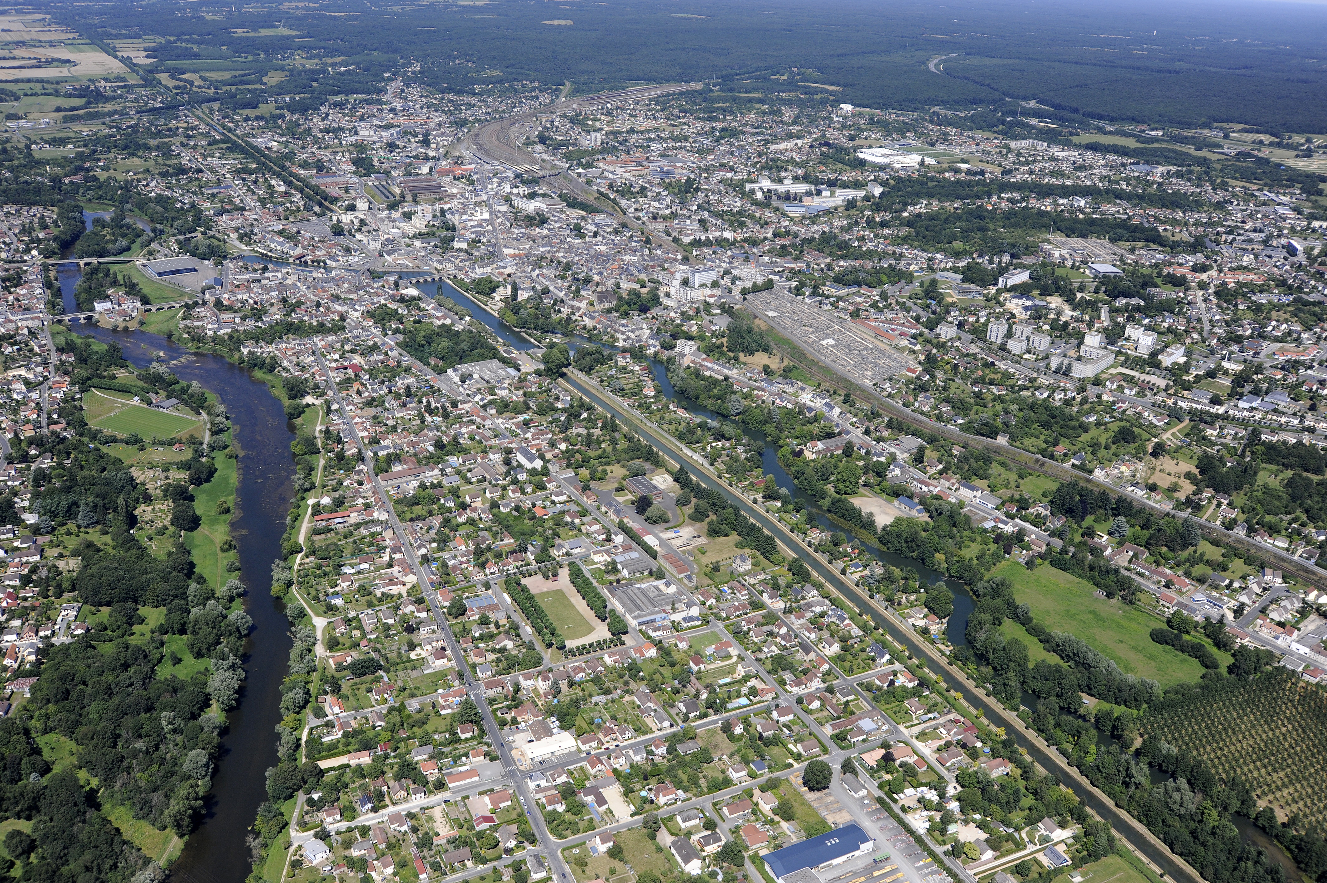 Vue aérienne de Vierzon